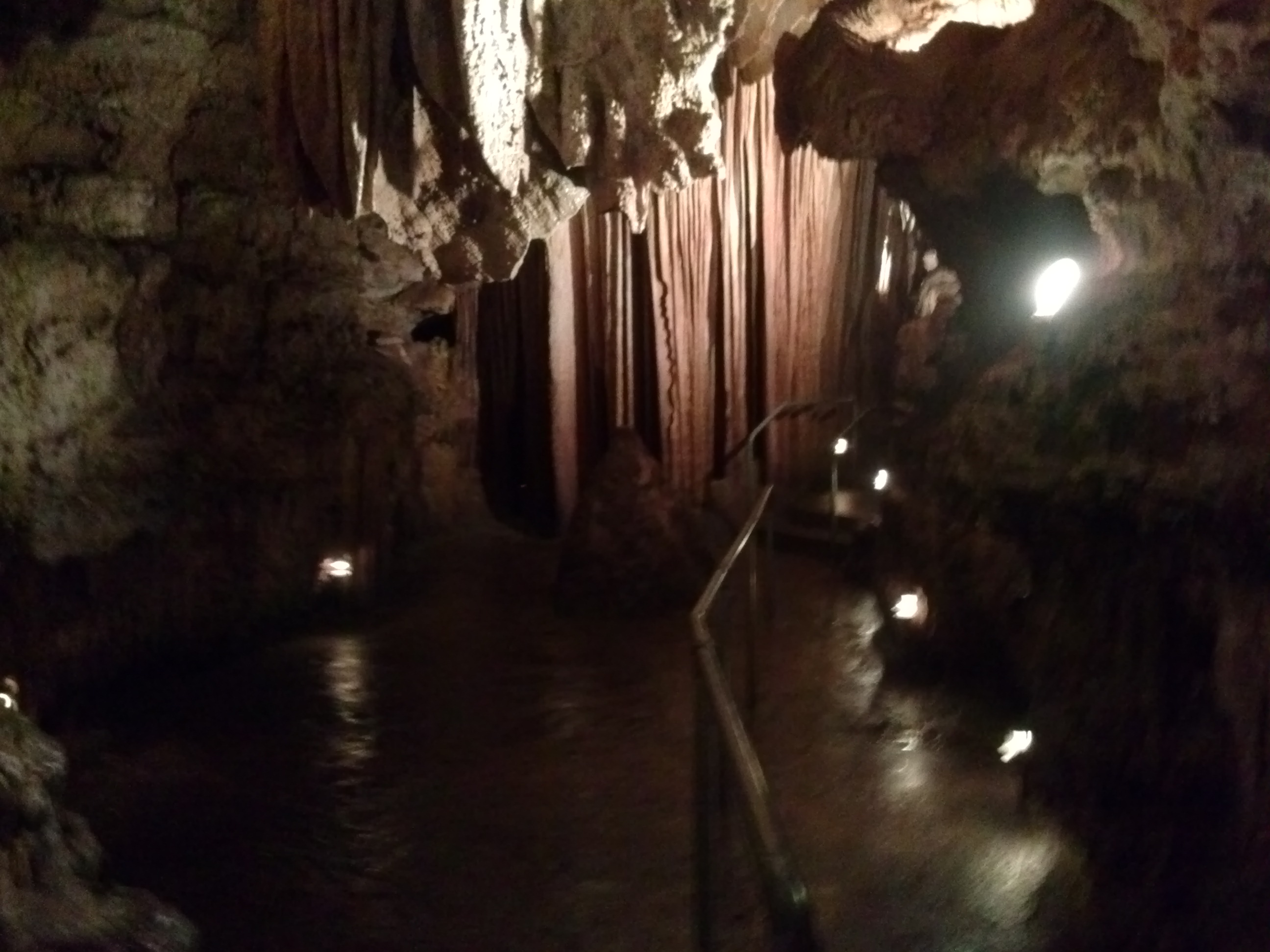 Bridal Chapel